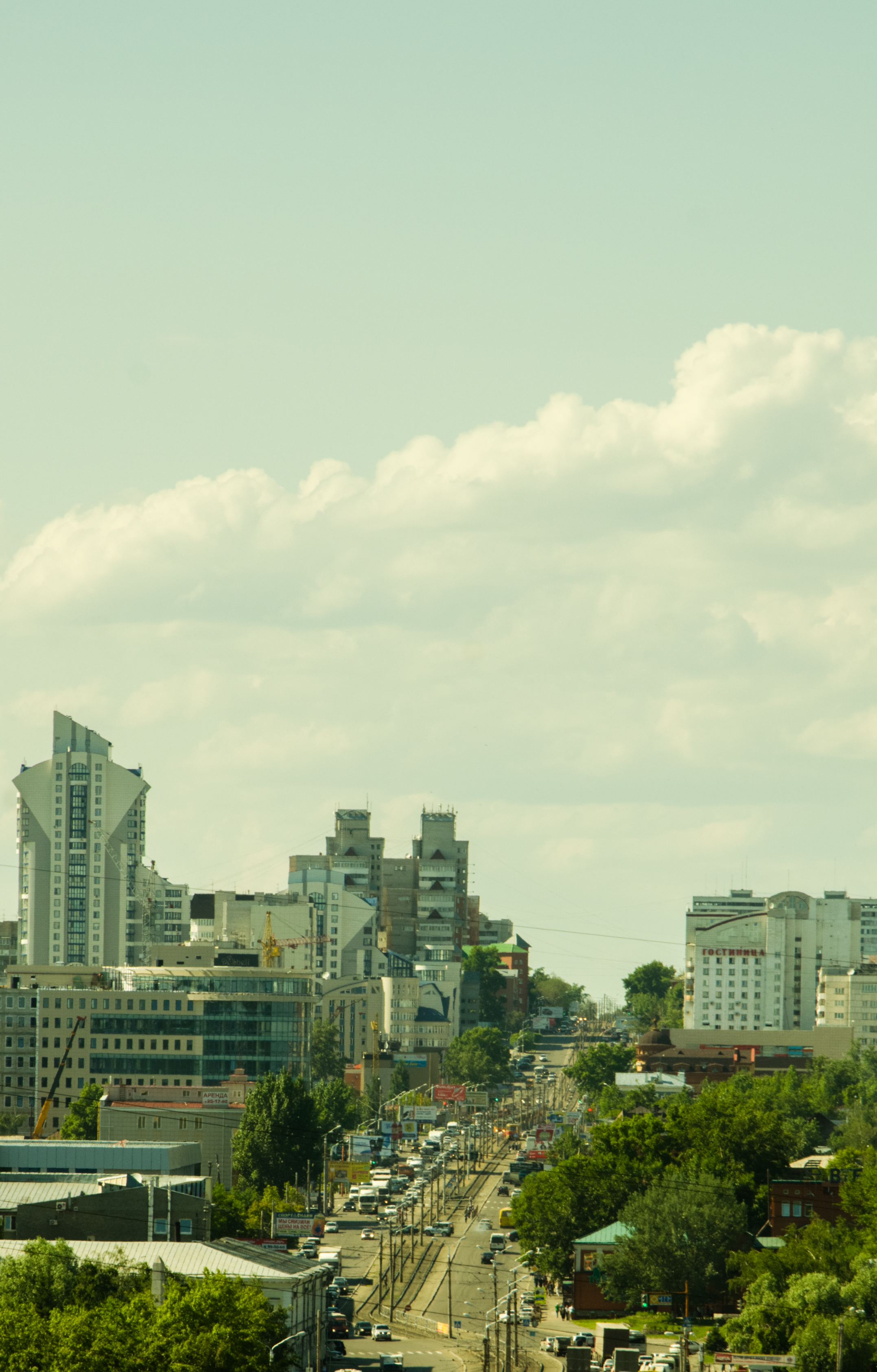 Барнаул вид Красноармейского проспекта с горы